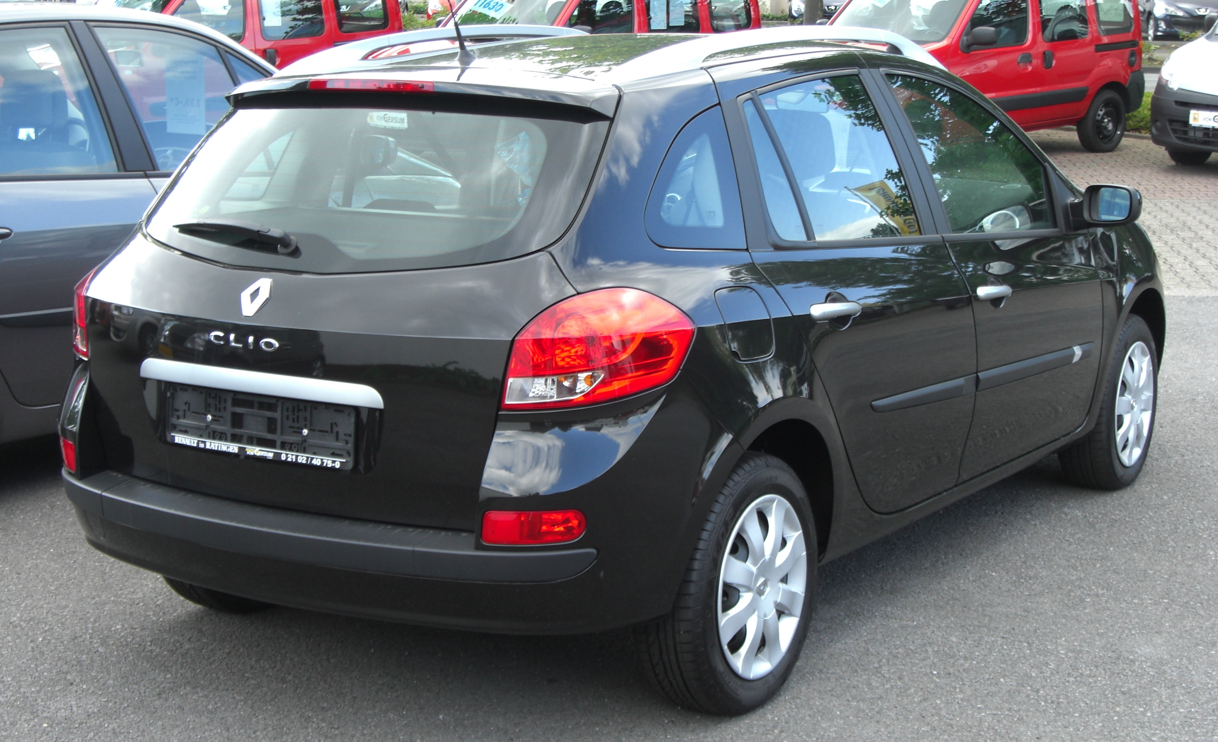 Renault Clio Grandtour